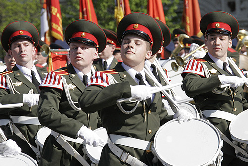 Москва. Красная площадь. Военный парад в честь 64-й годовщины Победы в Великой Отечественной войне.